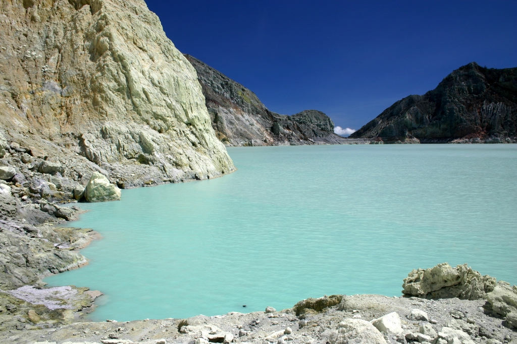 Sulfur mining operation at Kawah Ijen, Java Indonesia.